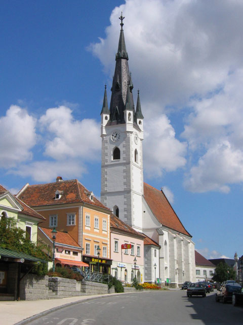 Quelle: Foto Benutzer:Plp|plp Benutzer Diskussion:Plp Ort: Horn Datum de:2004 Lizenz: GFDL